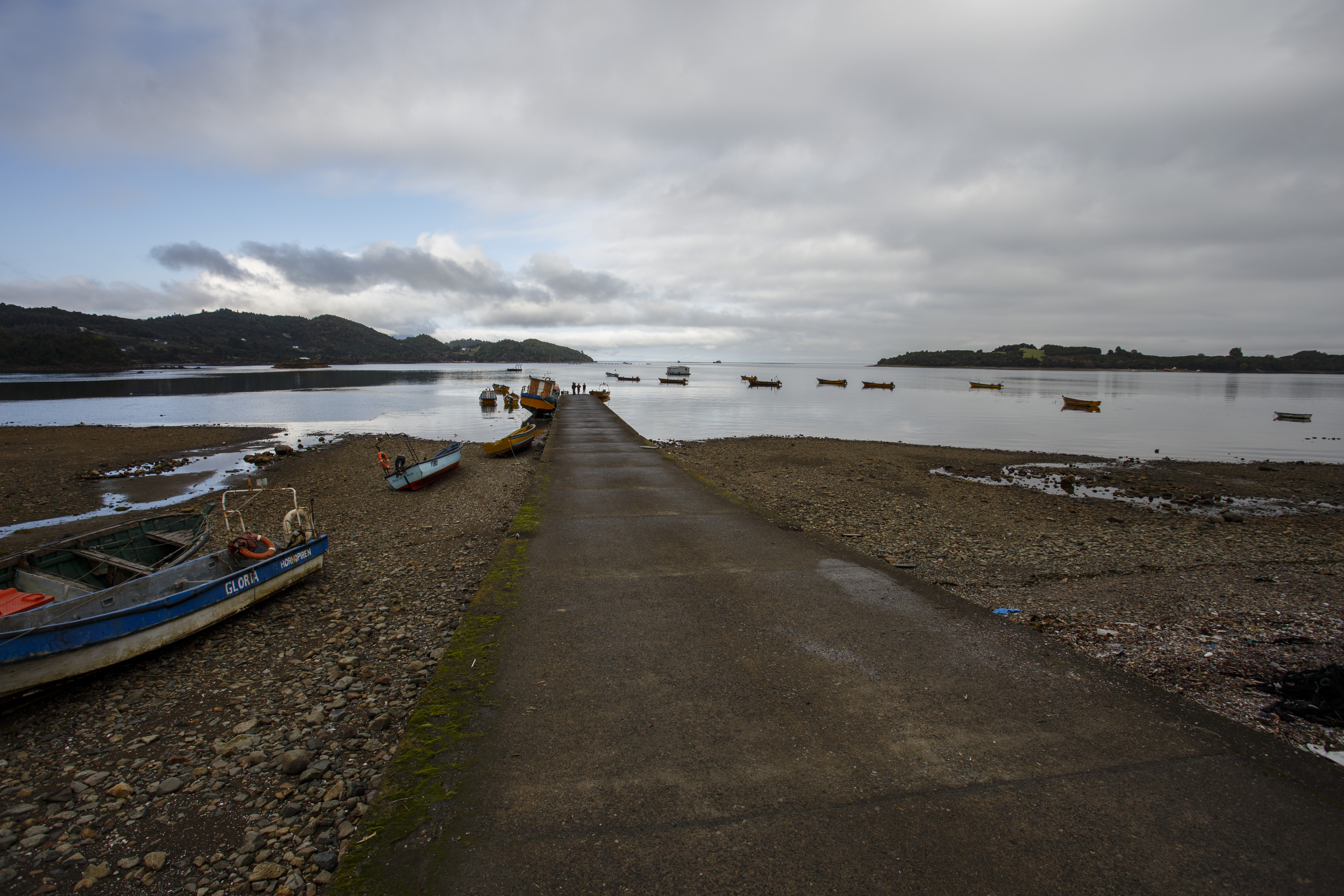 Rampa de Caleta El Manzano, Hualaihué, Chile.